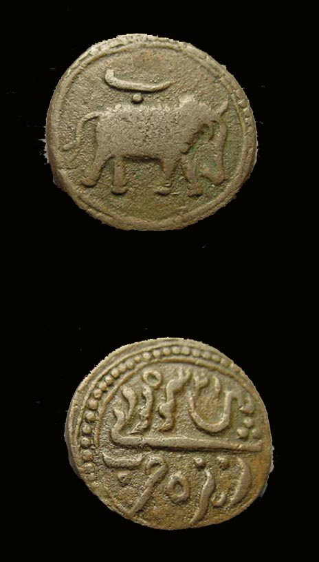 INDIA OLD COINS[TIPPU ELEPHENT MARK] 1796-↔LL.GFDL-SELF NAJEEB TANUR